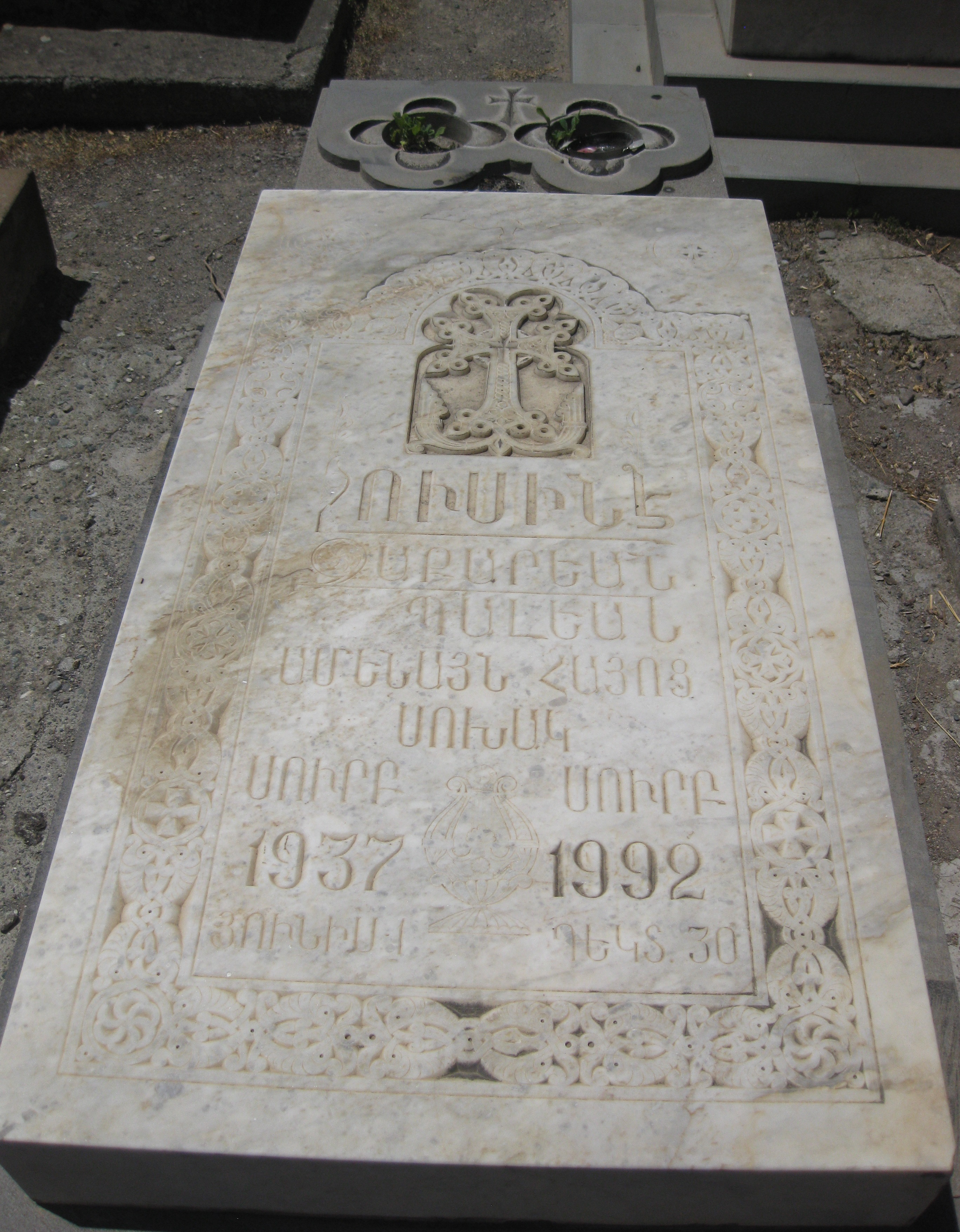 Լուսինե Զաքարյանի տապանաքարը Էջմիածին քաղաքի Սուրբ Գայանե եկեղեցու բակի գերեզմանատանը